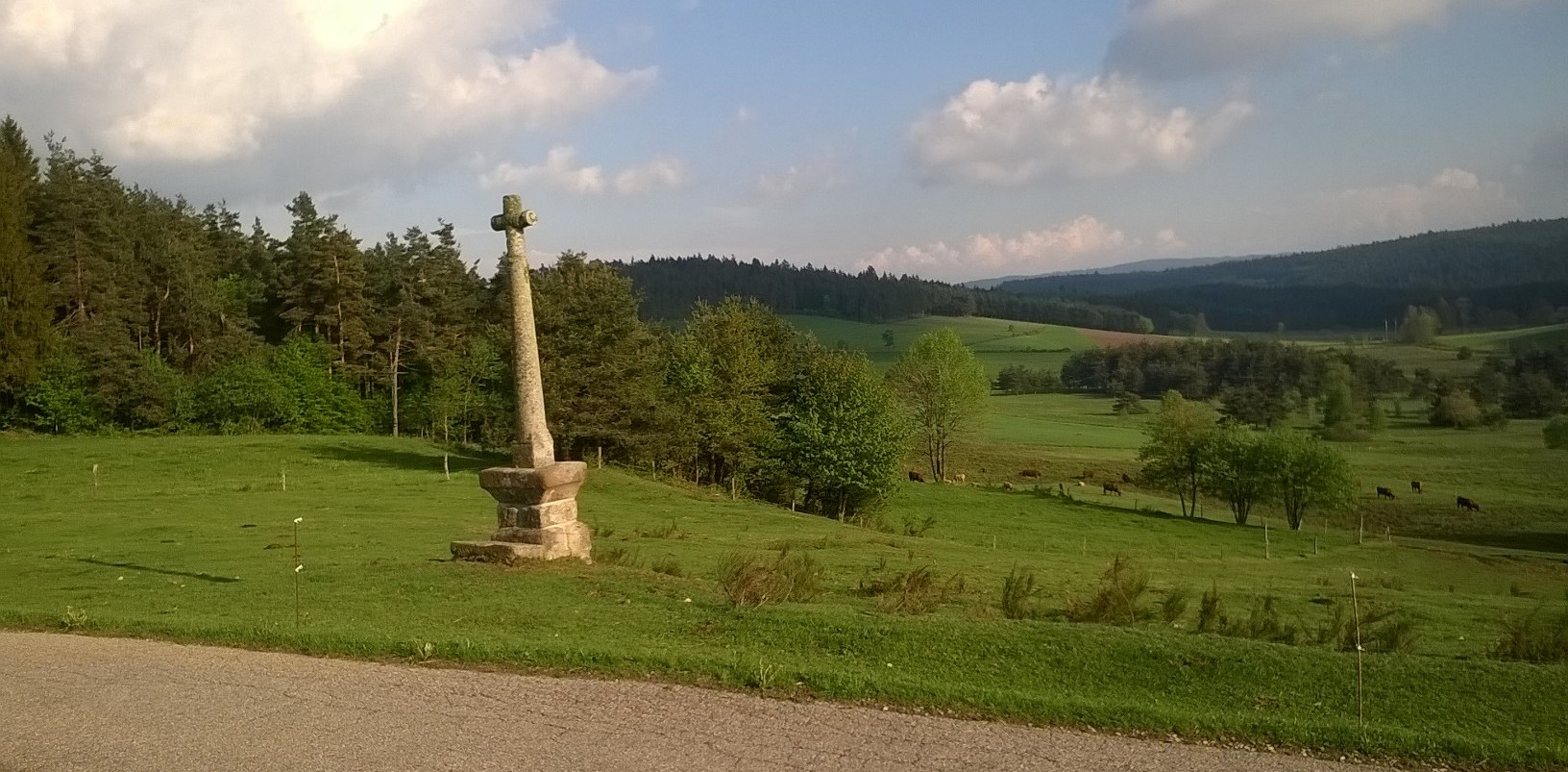 montregard15